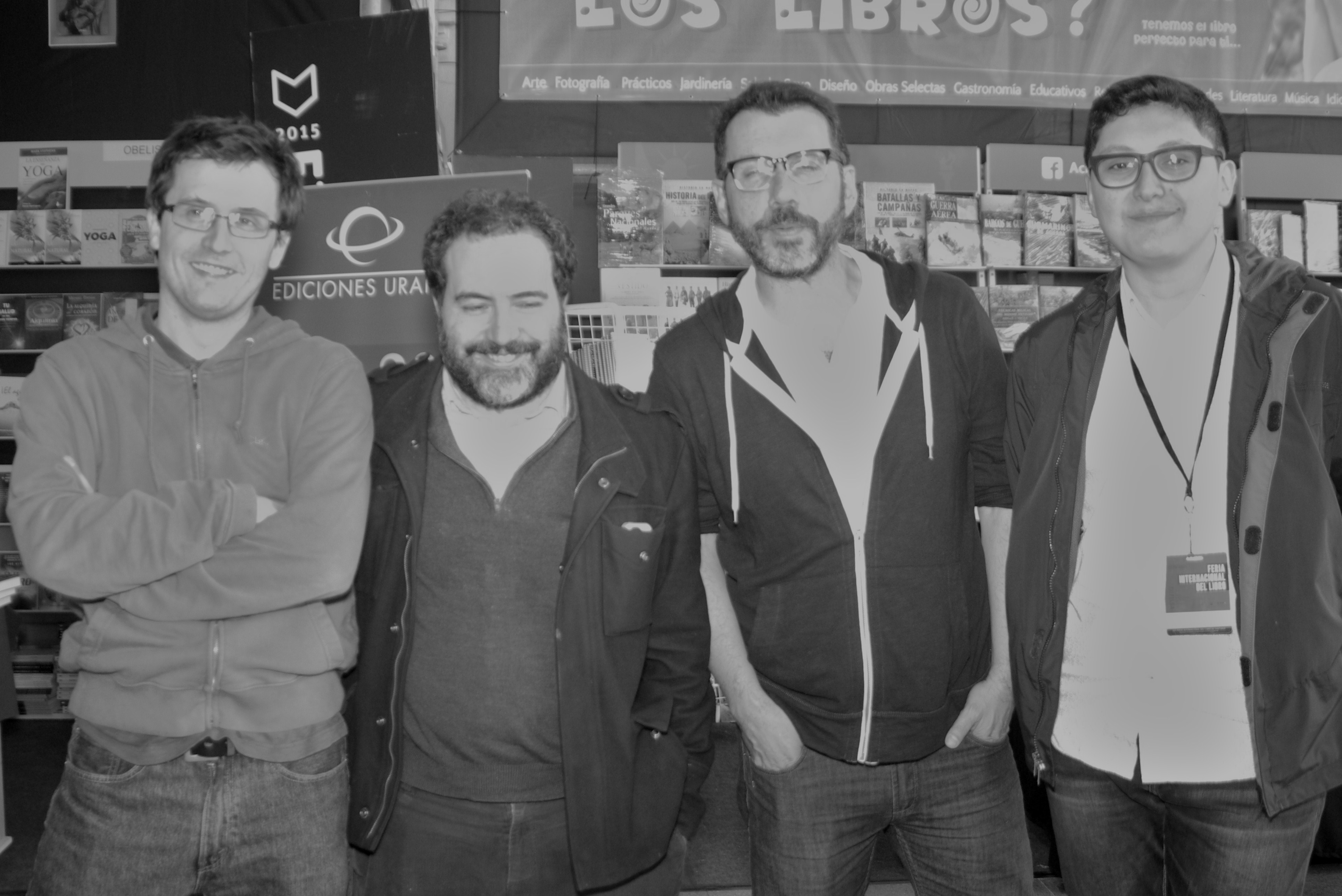 Los escritores chilenos Rafael Gumucio (2º de izq a der) y Alberto Fuguet (3º) con el editor Vicente Undurraga y Aldo Perán, ambos de Penguin Random House, en la Feria Internacional del Libro de Santiago 2015